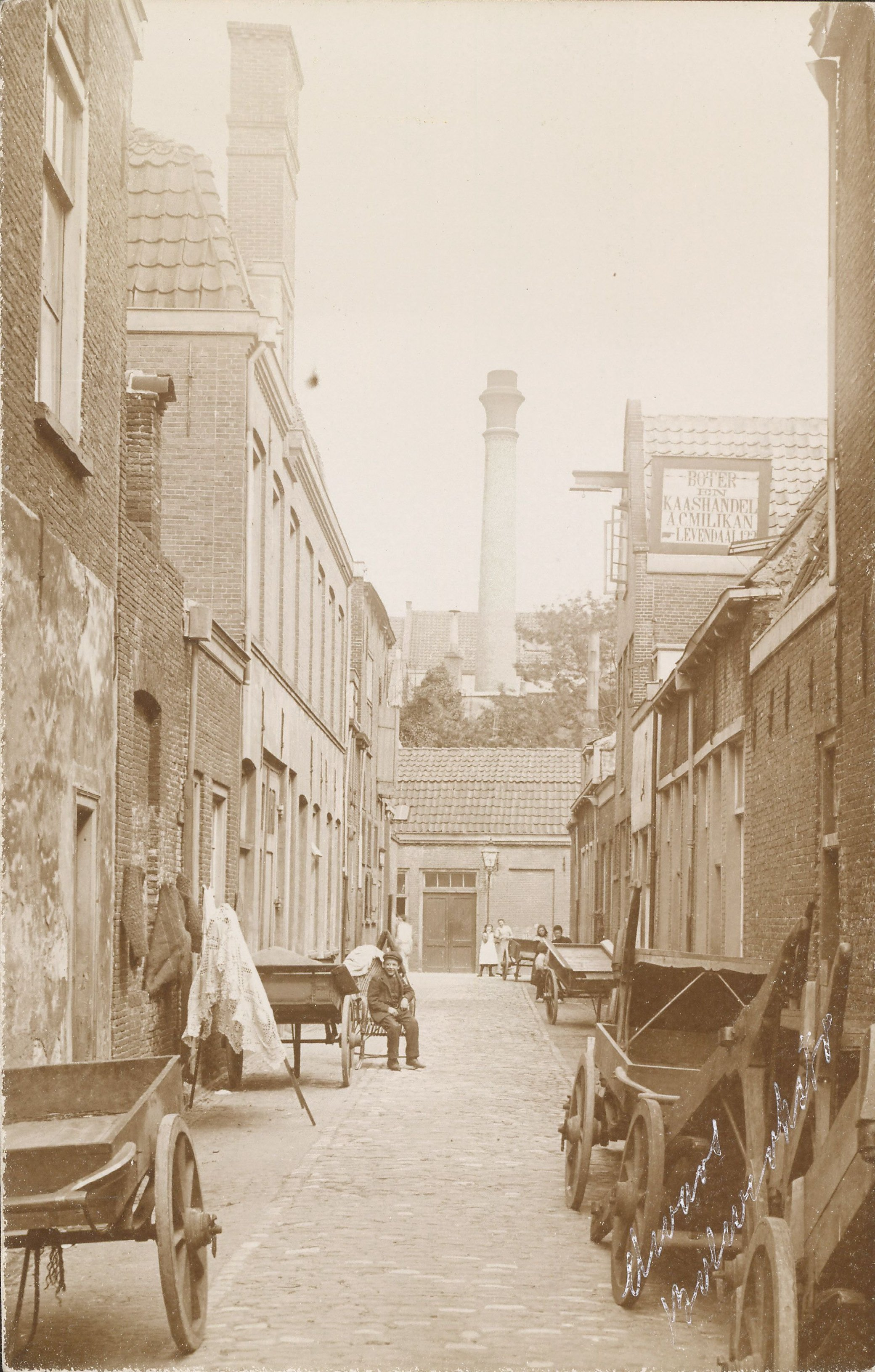 Dwarsbolwerkstraat gezien van de Kraaierstraat naar de Bolwerkstraat. Links en rechts geparkeerde handkarren.